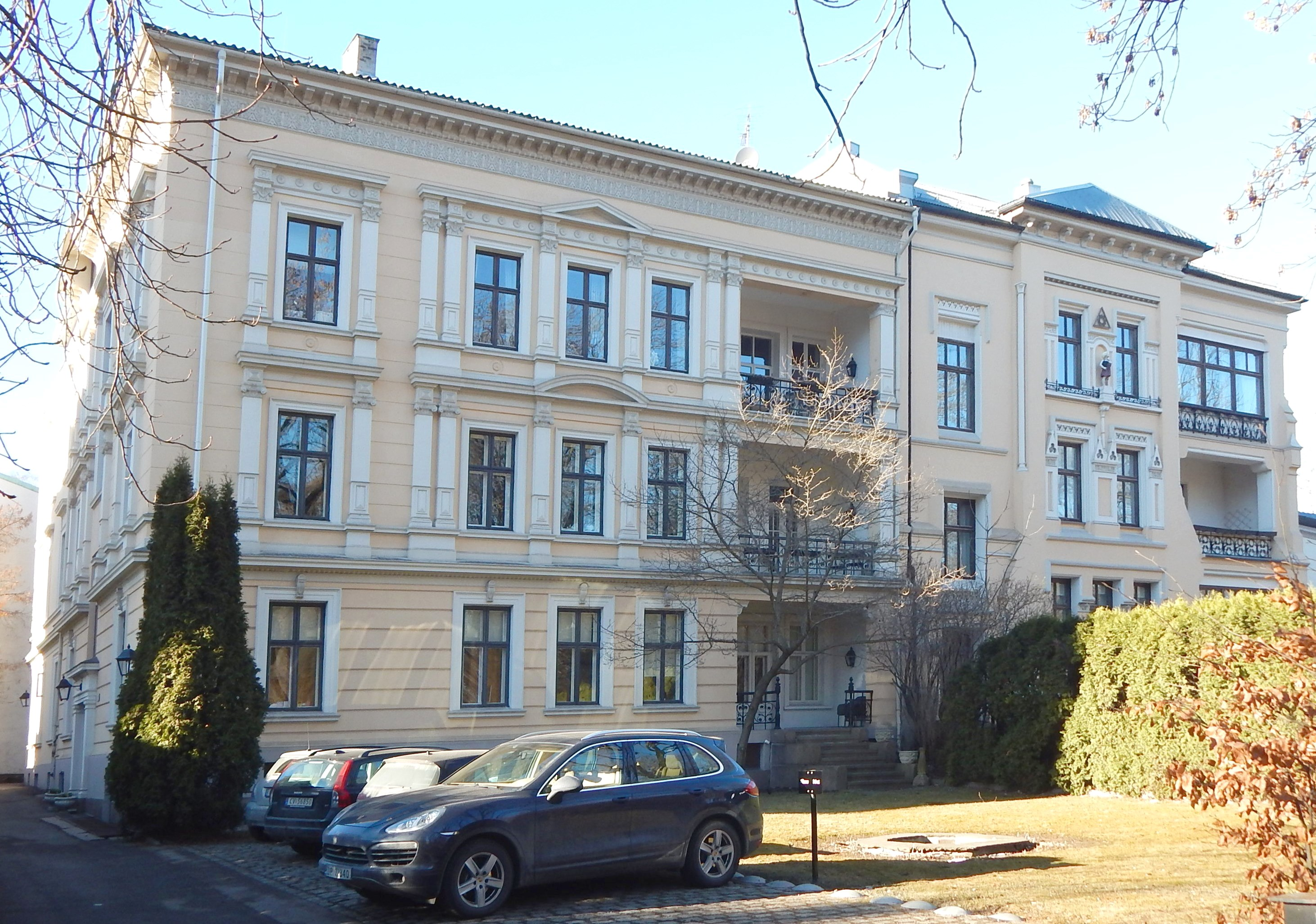 Parkveien 41B (til venstre; bygget sammen med 41A). Arkitekt: Anselm Liljeström (1885).